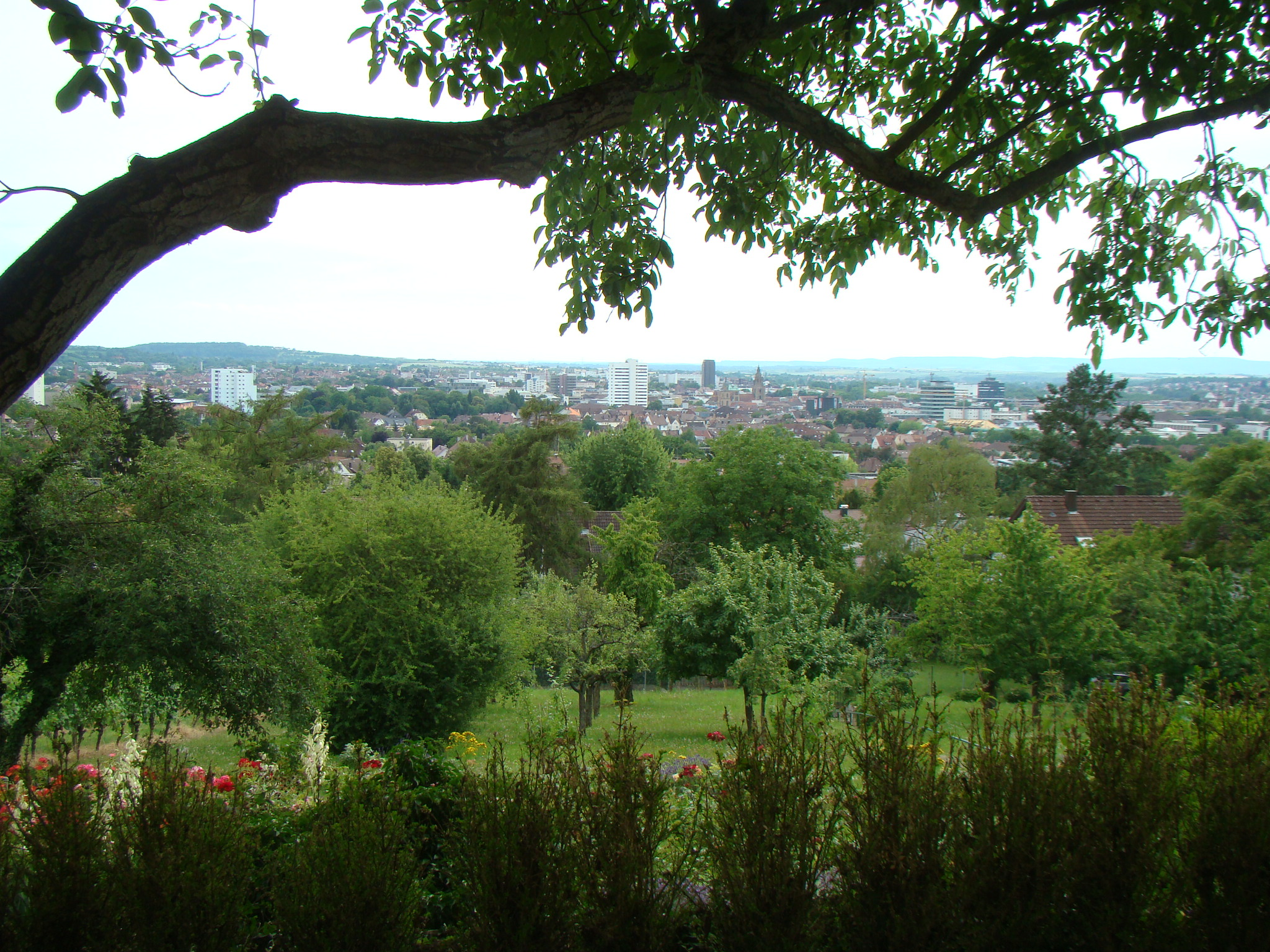 Blick vom Seniorengarten über Heilbronn